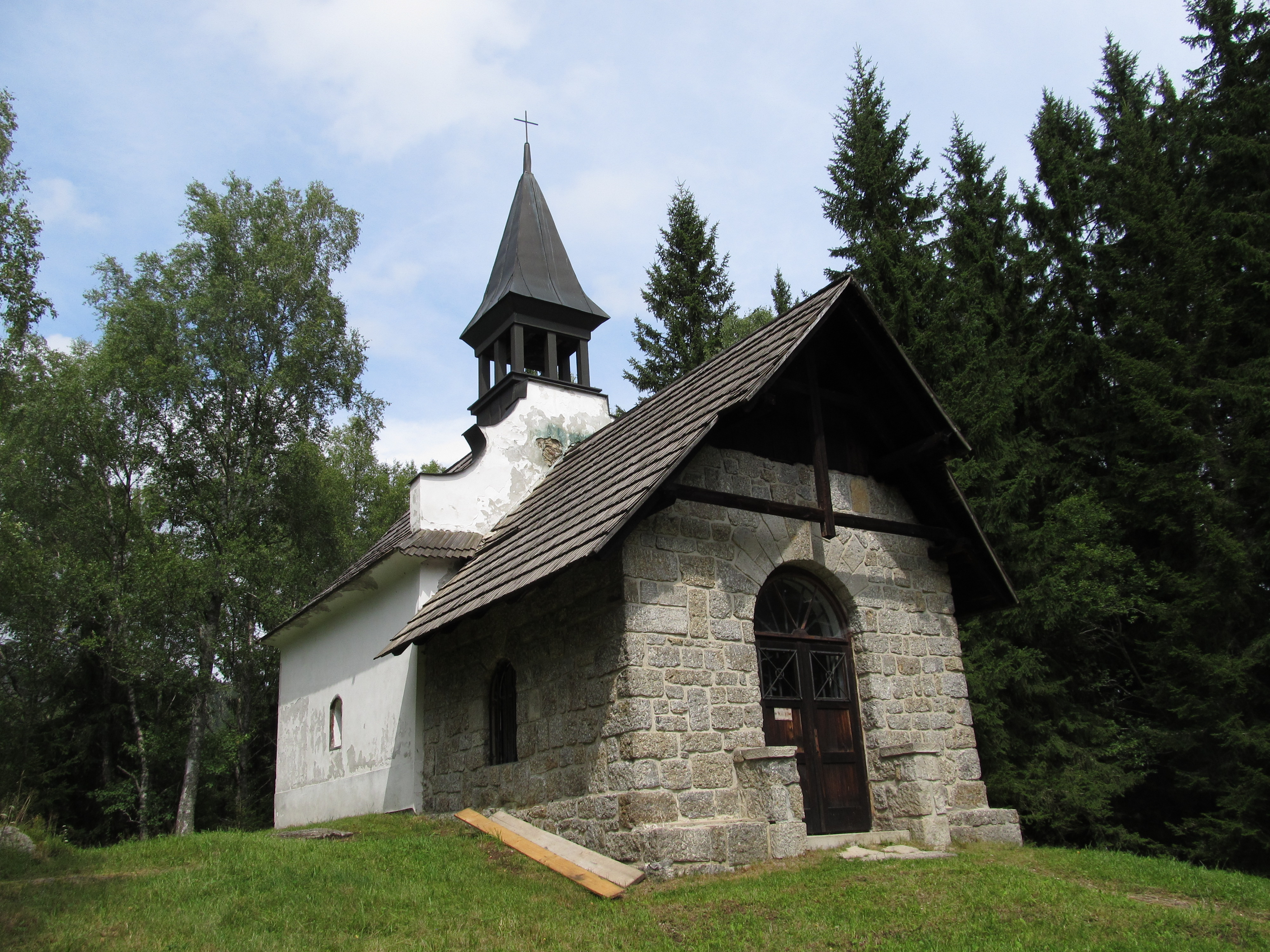 Kaple P. Marie Královny na hoře Steinberg (Strážný), Kamenný vrch, Strážný